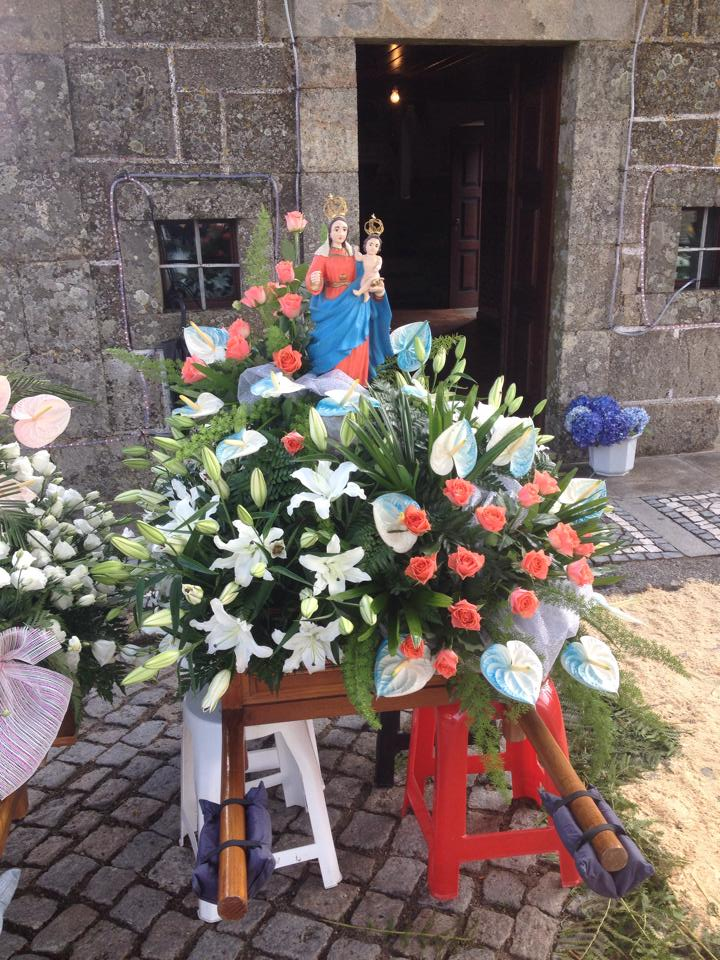 N Senhora da Saude